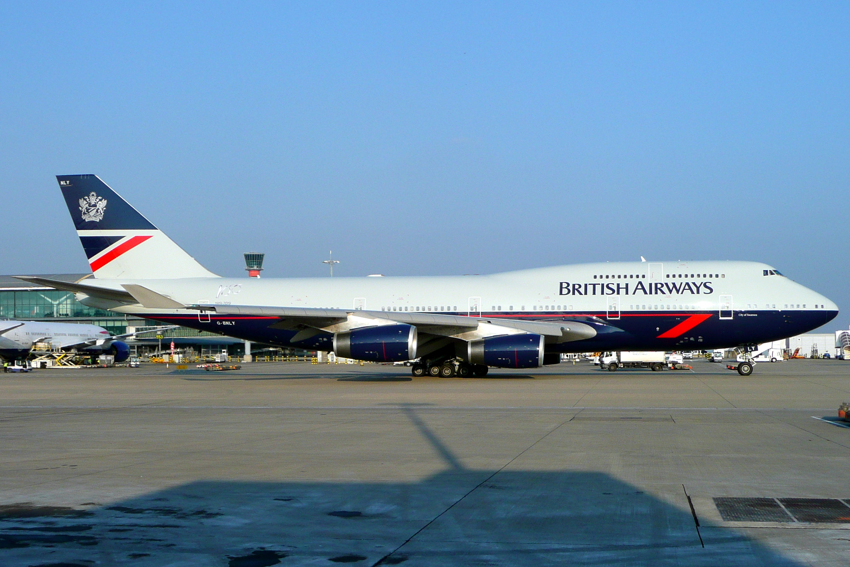 G-BNLY 29032019LHR BA67 LHR-PHL